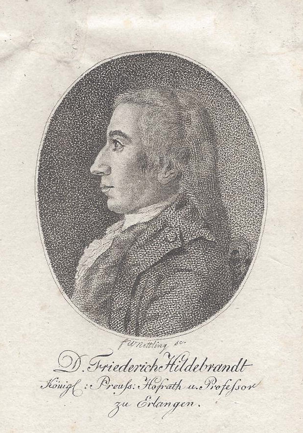 Georg Friedrich Hildebrandt, Kupferstich in Punktiermanier von Friedrich Wilhelm Nettlingum ca. 1795 nach einer Vorlage, die Eberhard Siegfried Henne vor 1792 zugeschrieben wird, Vergleiche: Wolfenbüttel, Herzog August Bibliothek, Inventar-Nr. A 9634, Literatur: Mortzfeld A 9634